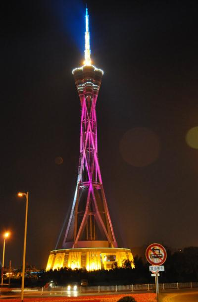 Zhongyuan tower